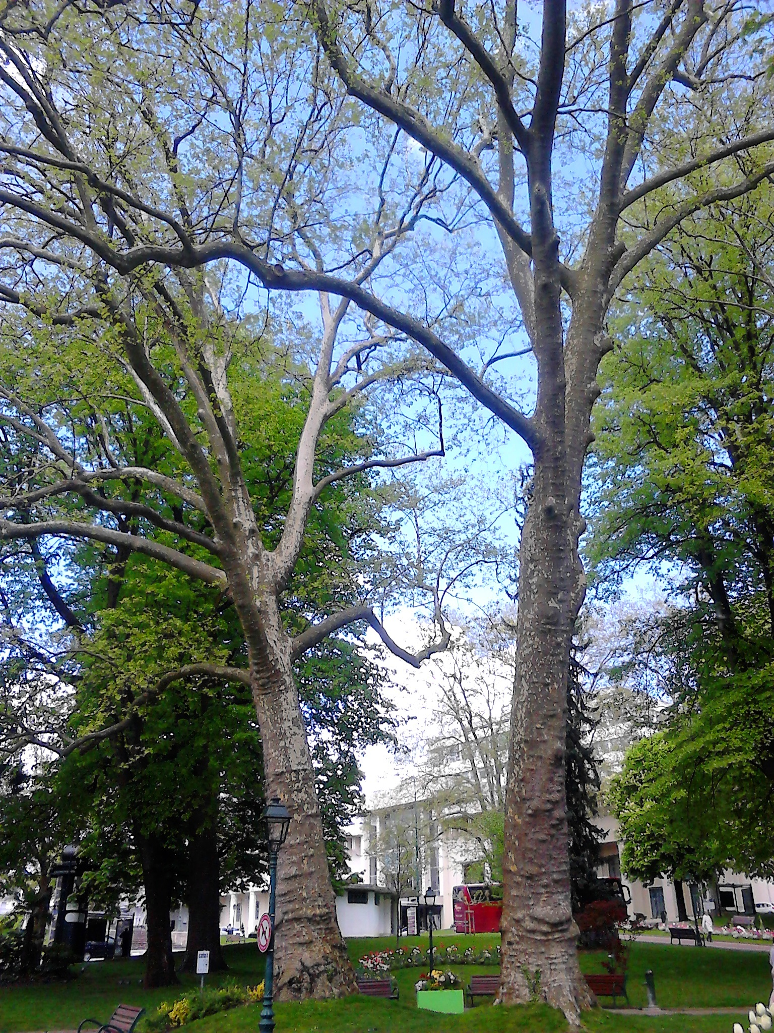 Deux arbres séculaires dans le parc floral des Thermes à Aix-les-Bains (73).